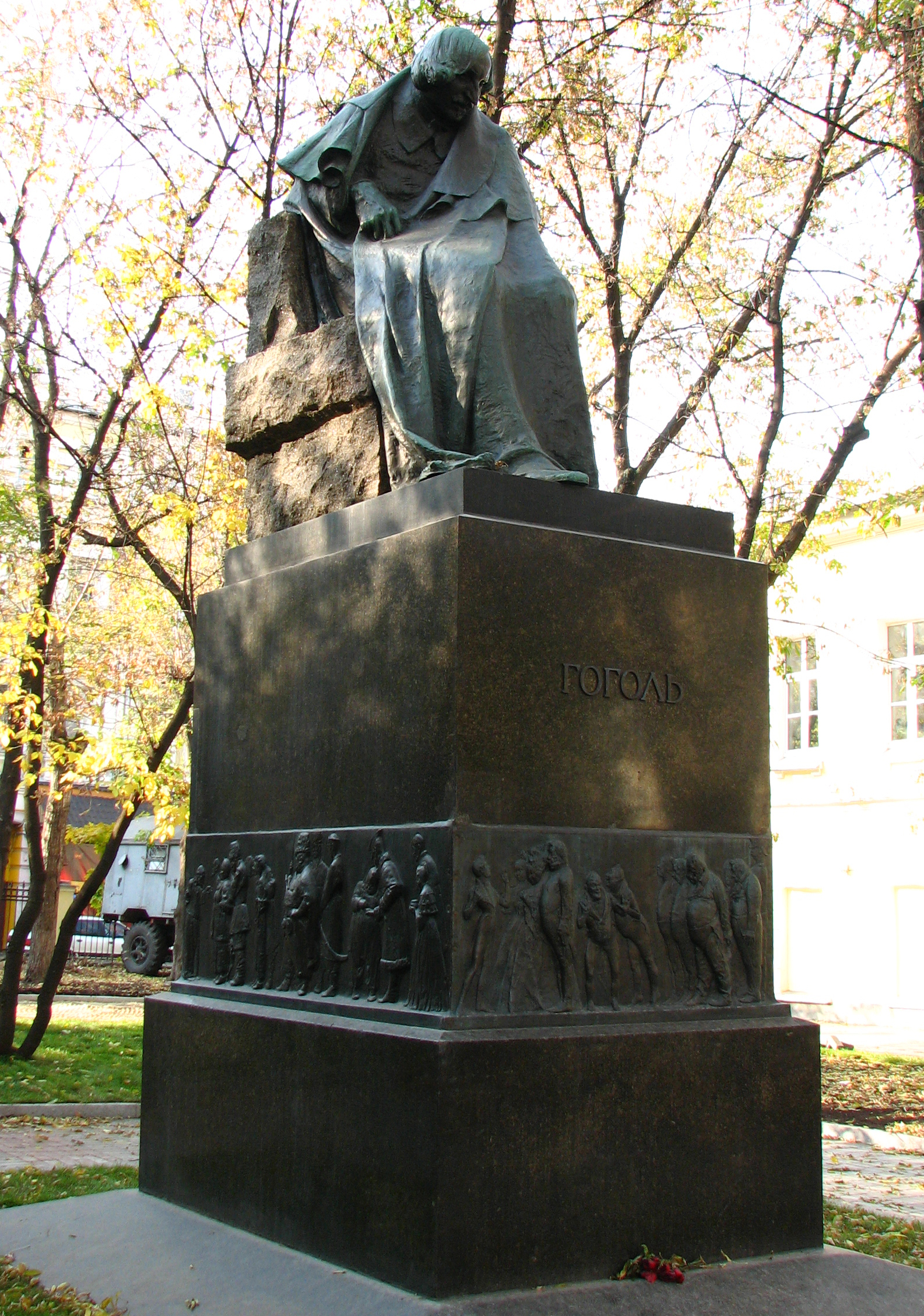 Памятник Н. В. Гоголю на Никитском бульваре (1909 г.; скульптор Николай Андреев)